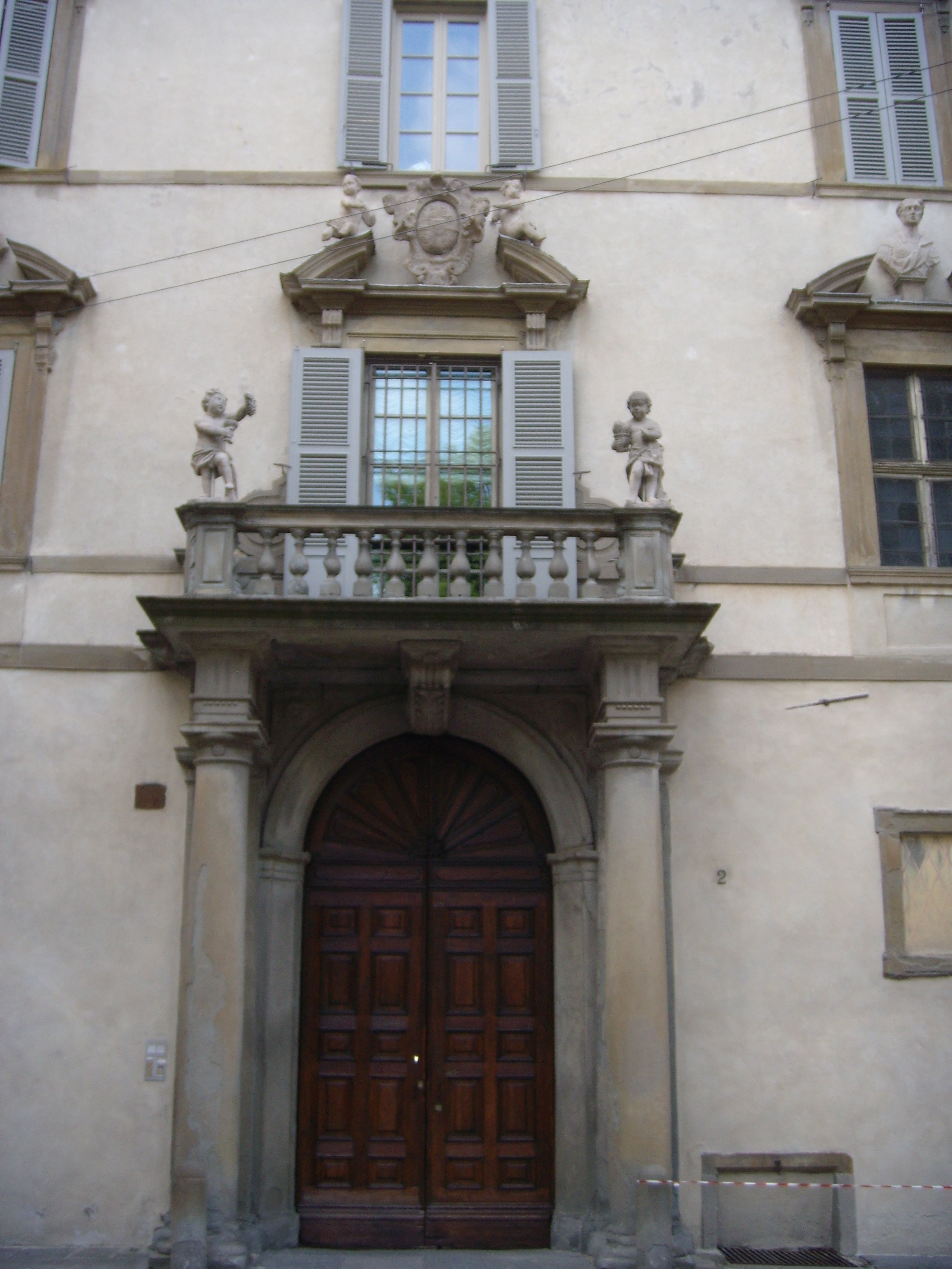 Portale d'ingresso palazzo Terzi con terrazzino e due putti raffiguranti l'autunno e l'inverno opera di Giovanni Antonio Sanz